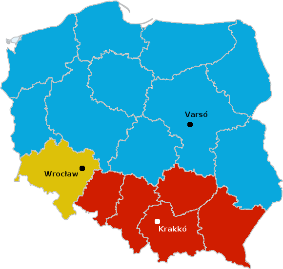 Magyar konzuli kerületek Lengyelországban